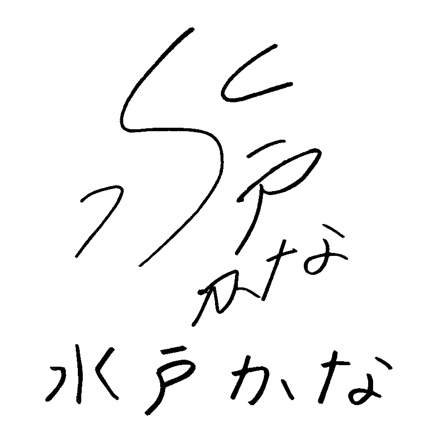 Kana Mito Signatures of people from Japan